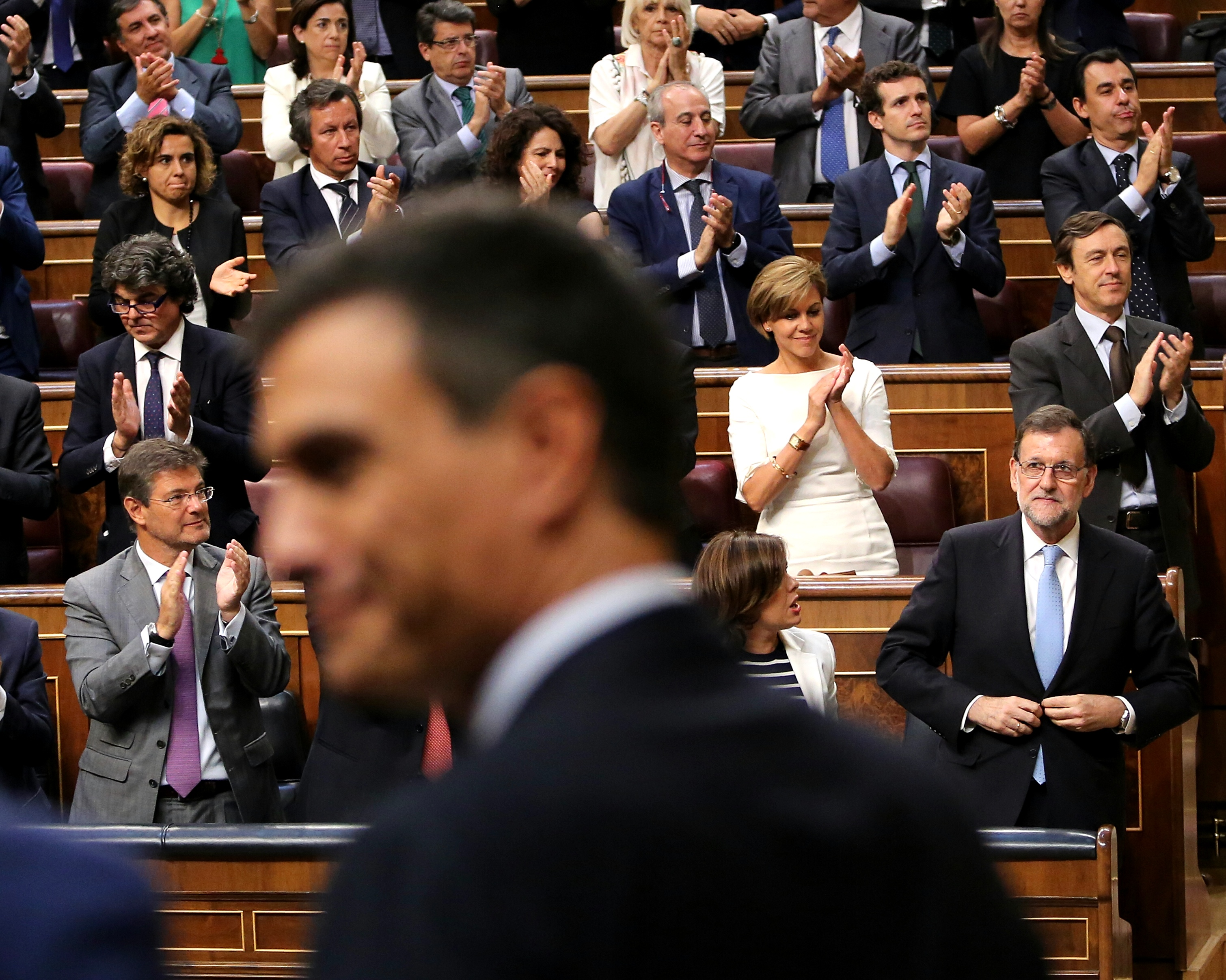 Pedro Sánchez y Mariano Rajoy, en la constitución del Congreso, el 19 de julio de 2016.